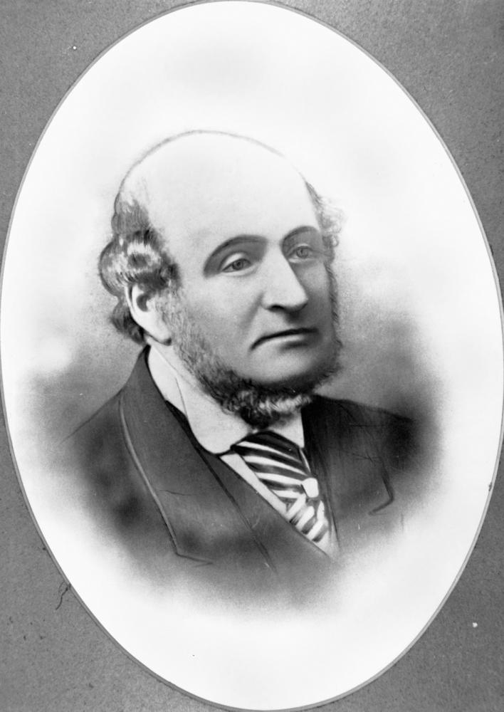 Sir Robert Ramsay Mackenzie, 3rd Premier of Queensland.